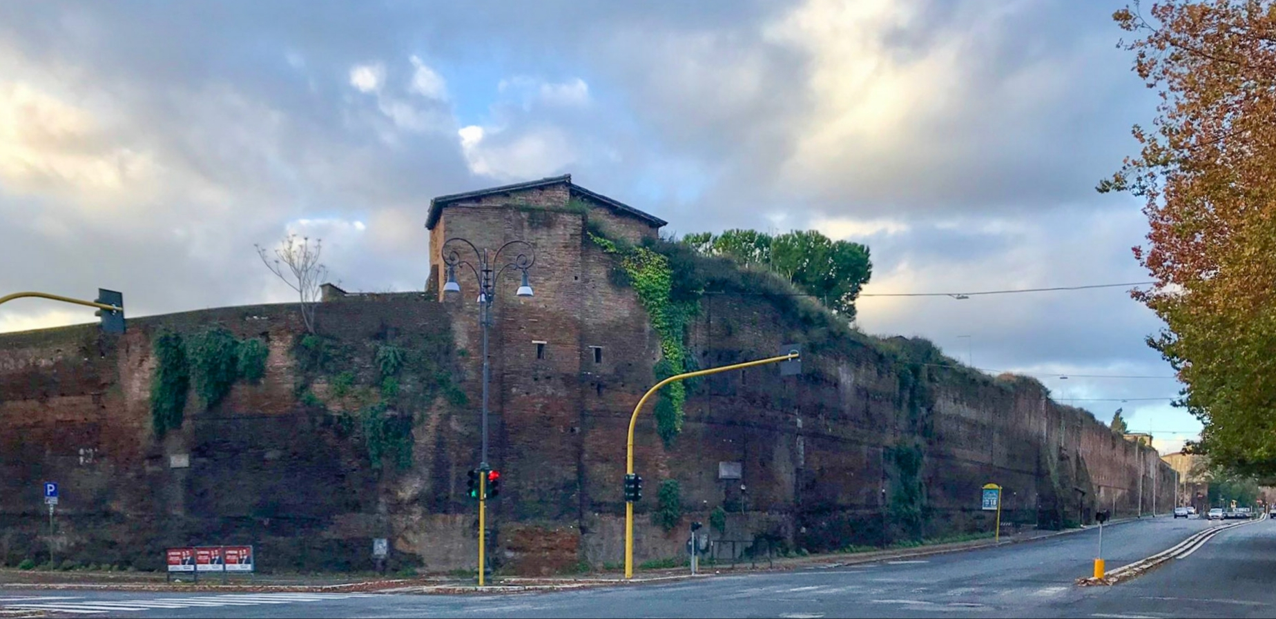 Castra Praetoria in Rome